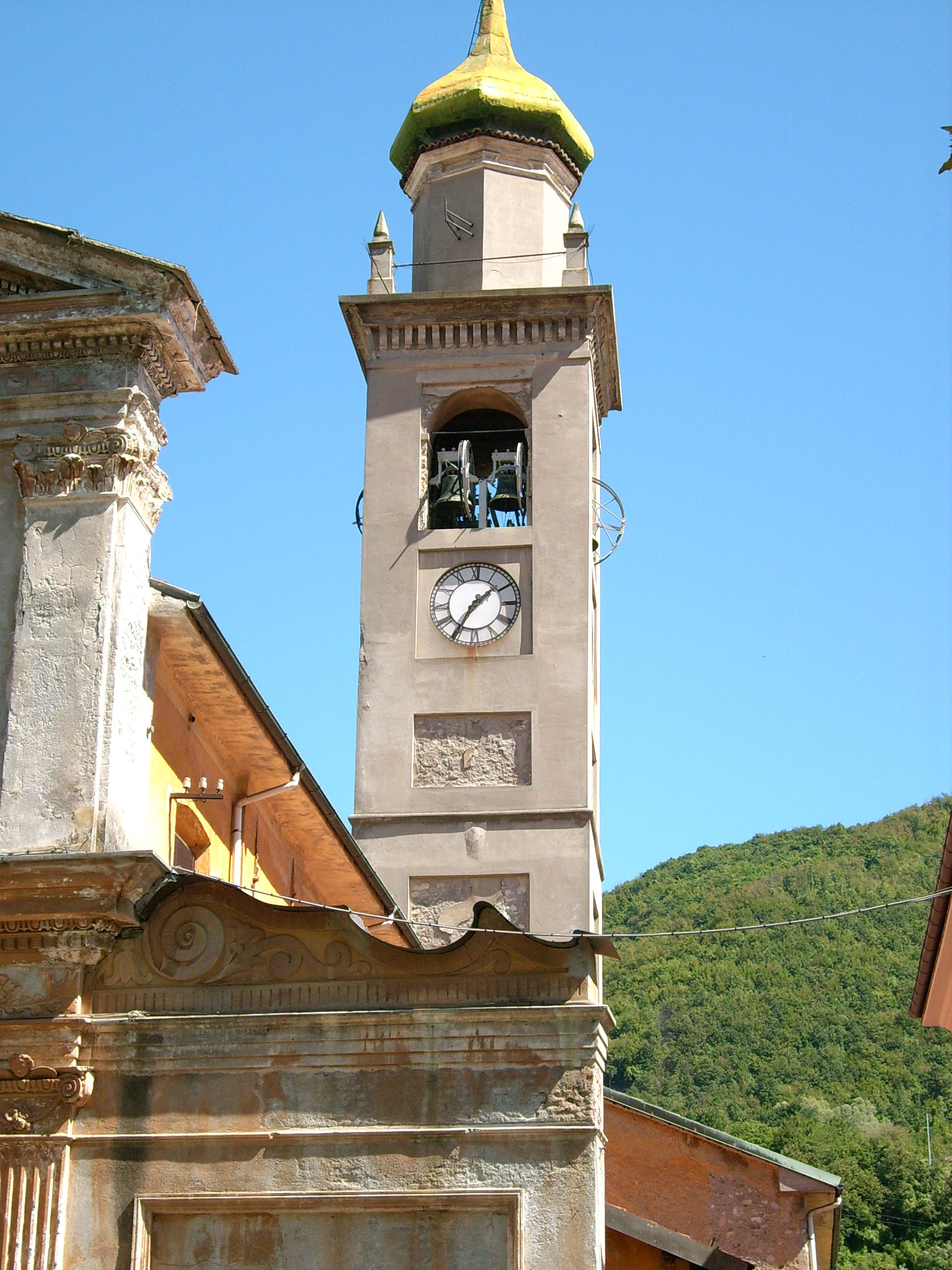 Campanile della chiesa di san Michele Arcangelo di Isola del Cantone, Liguria, Italia